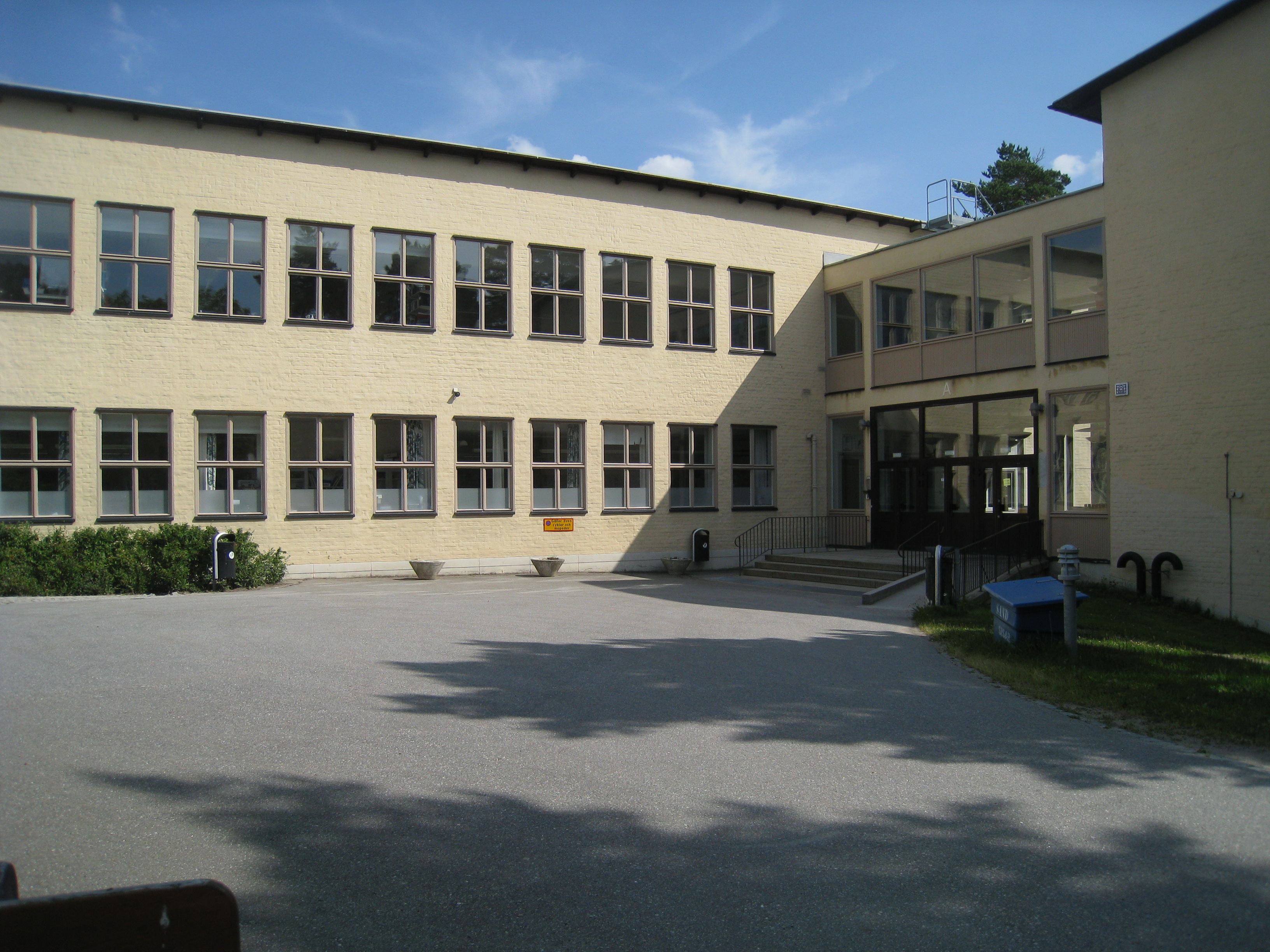 Äppelviksskolan, Alviksvägen 97, Bromma. Skolbyggnaden med huvudentrén.